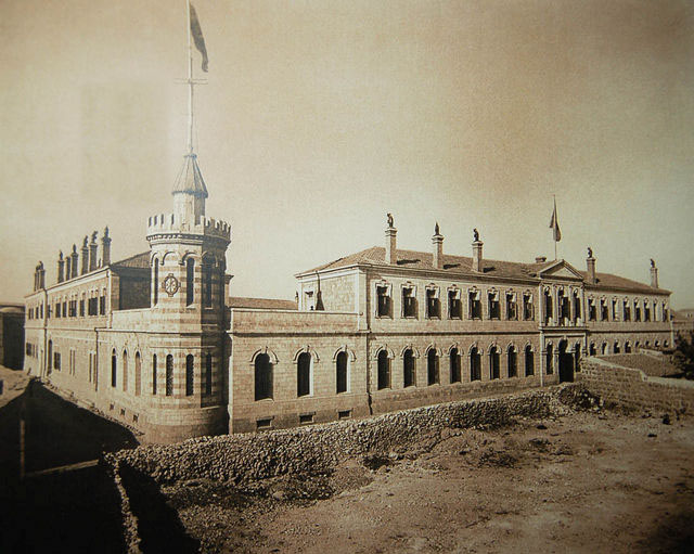 Сергиевское подворье в Иерусалиме